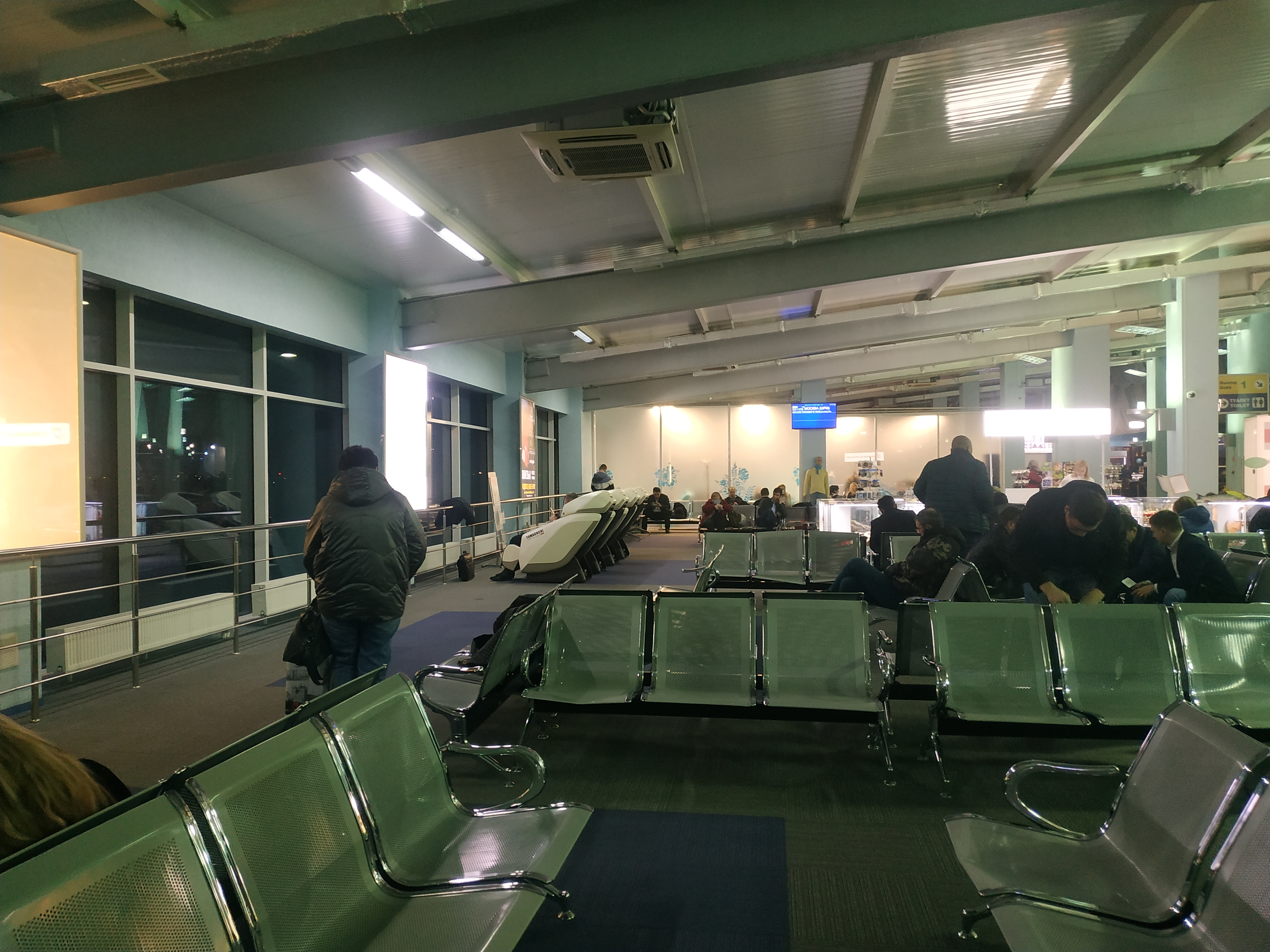 Аэропорт Астрахань, интерьер накопителя